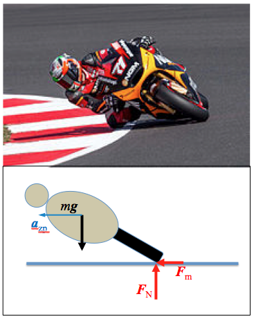 Bi irudiren konposizioa: Wikipediako argazkia (Claudio_Corti_Silverstone_2013) eta indarren eskema (nik egina).